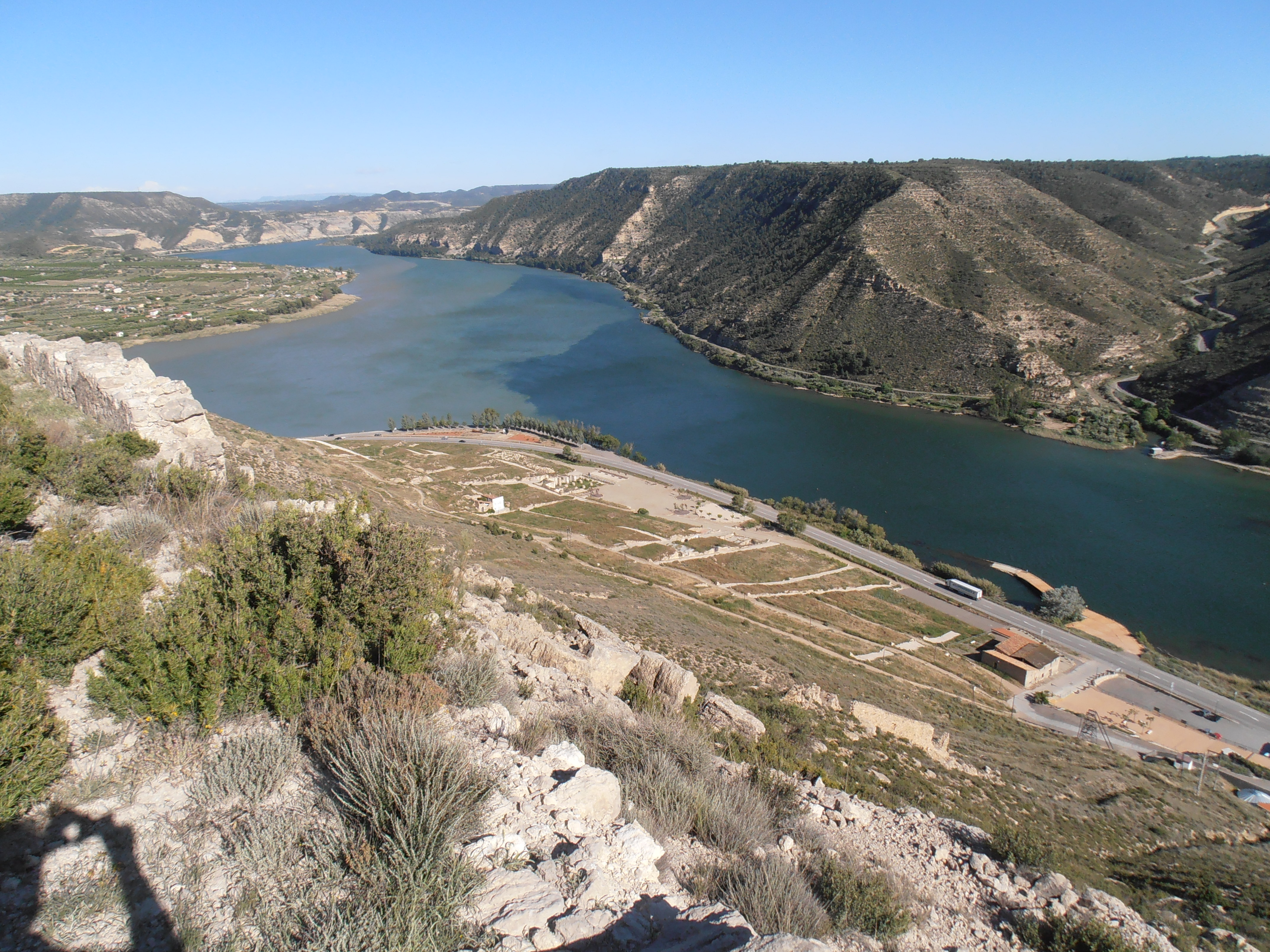 Vista de l'aiguabarreig dels rius Ebre i Segre a Mequinensa, des de turó del castell